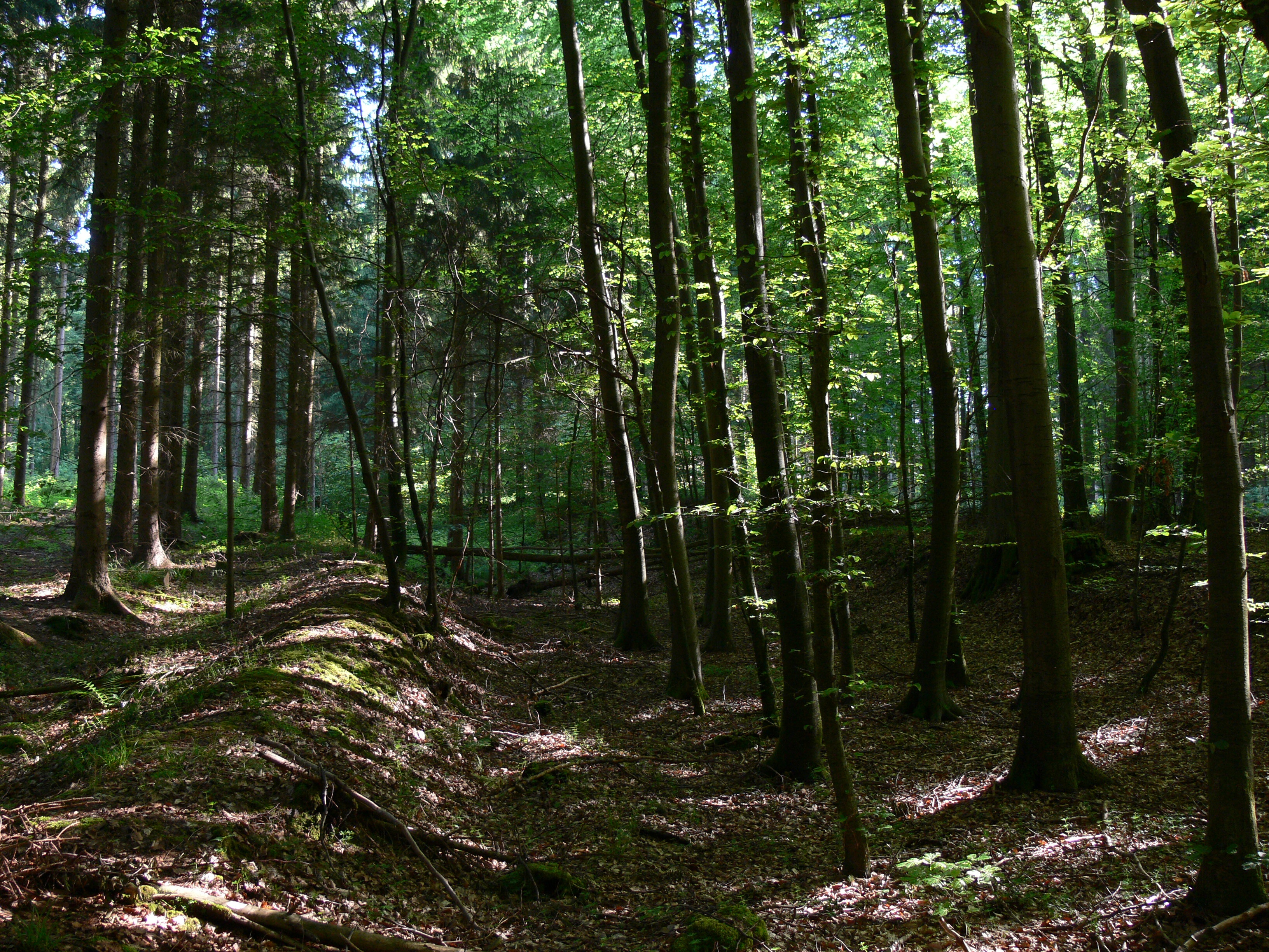 Überreste der Hohen Straße zwischen Kocher und Jagst im Harthäuser Wald an der L1095 in Baden-Württemberg